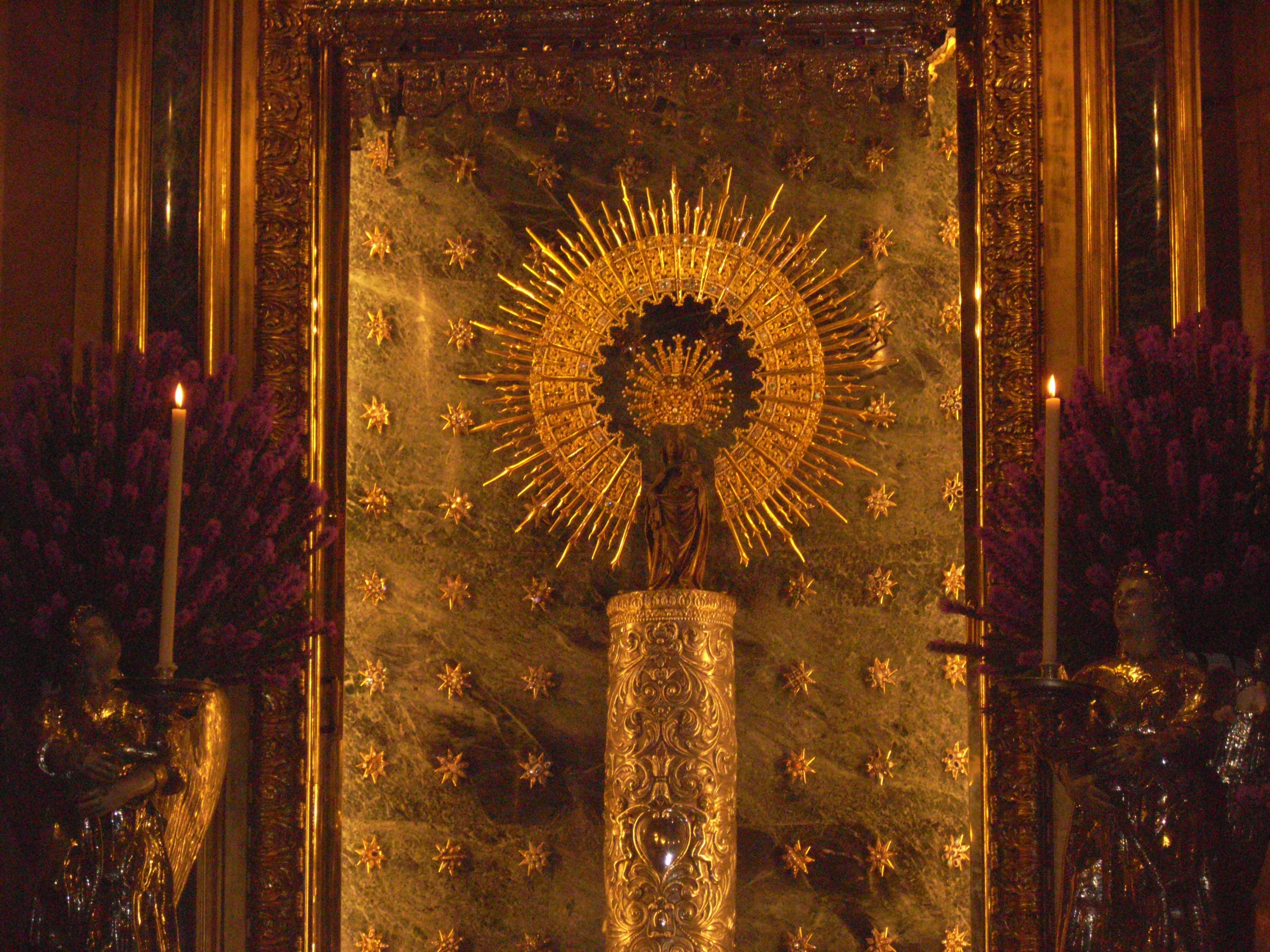 Virgen del Pilar en su camarín de la basílica homónima de la ciudad de Zaragoza (España). La imagen fue tomada un día 2, motivo por el cual la Virgen se muestra, de forma excepcional, sin manto (esto sucede los días 2, 12 y 20 de cada mes).